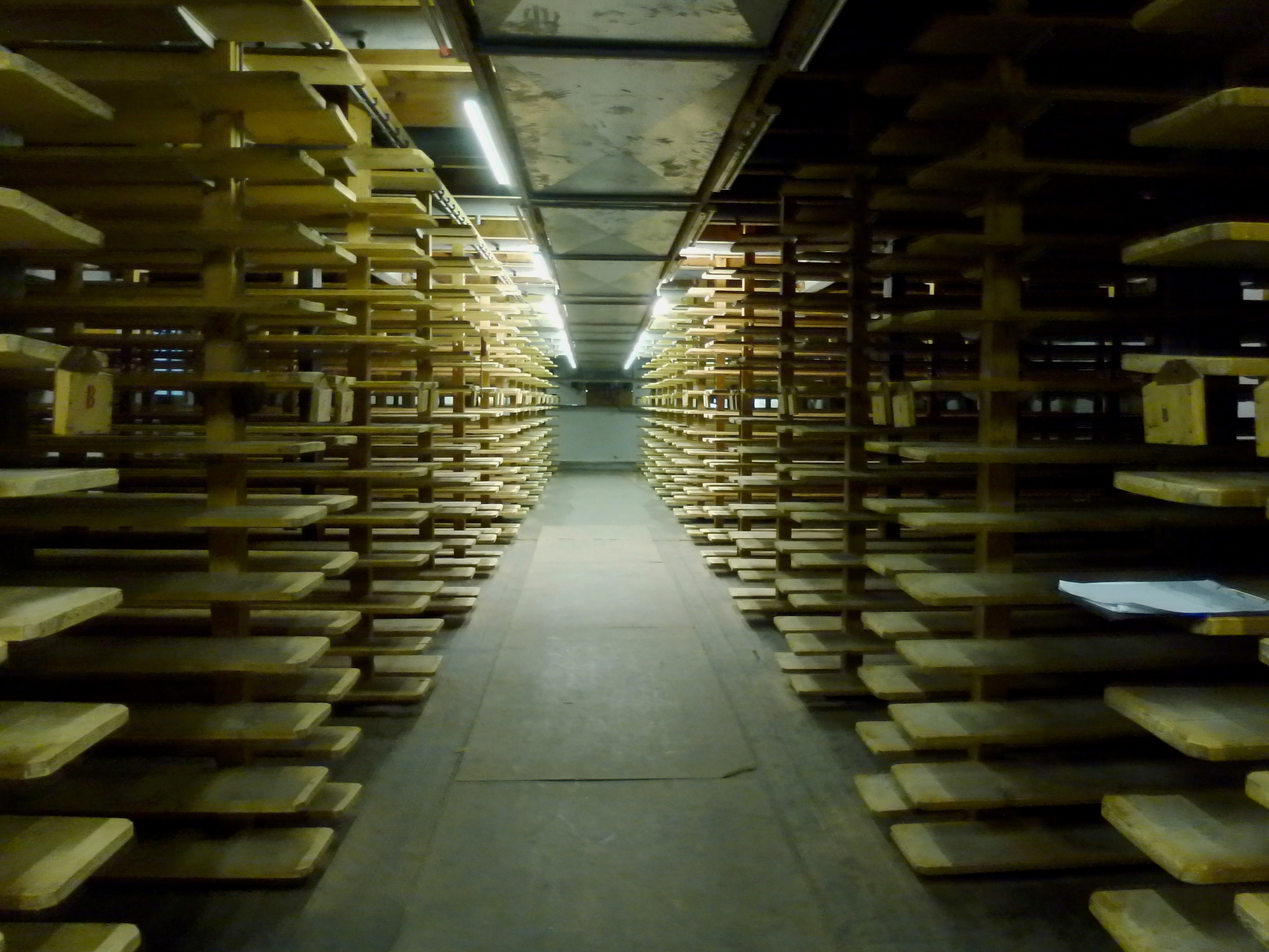 Kaaspakhuis De Producent in Gouda. Opslagruimte, kaaskelder, rijpingskelder/ruimte, kaaszolder. Hier lagen kilo kazen van 12, 25, 30, 60 kilogram. Per etage, was 1 zolderbaas. Het werk, kaasonderhoud, bestond uit het keren, plastificeren en poetsen van de kazen. Aan iedere plank hing een bakje met daarin kaartjes en daarop zoldernummer, partijkaas, naam van de boer en leeftijd van de kaas. De kazen lagen in het pakhuis voor een bepaalde tijd, de rijping of affinage. Van jong t/m oude kaas. Het pakhuis wordt niet meer voor kaasopslag gebruikt, het krijgt een woonfunctie.